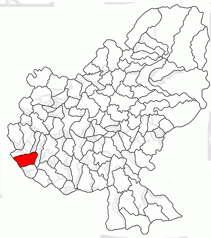 Categorie:Hărţi ale judeţului Mureş